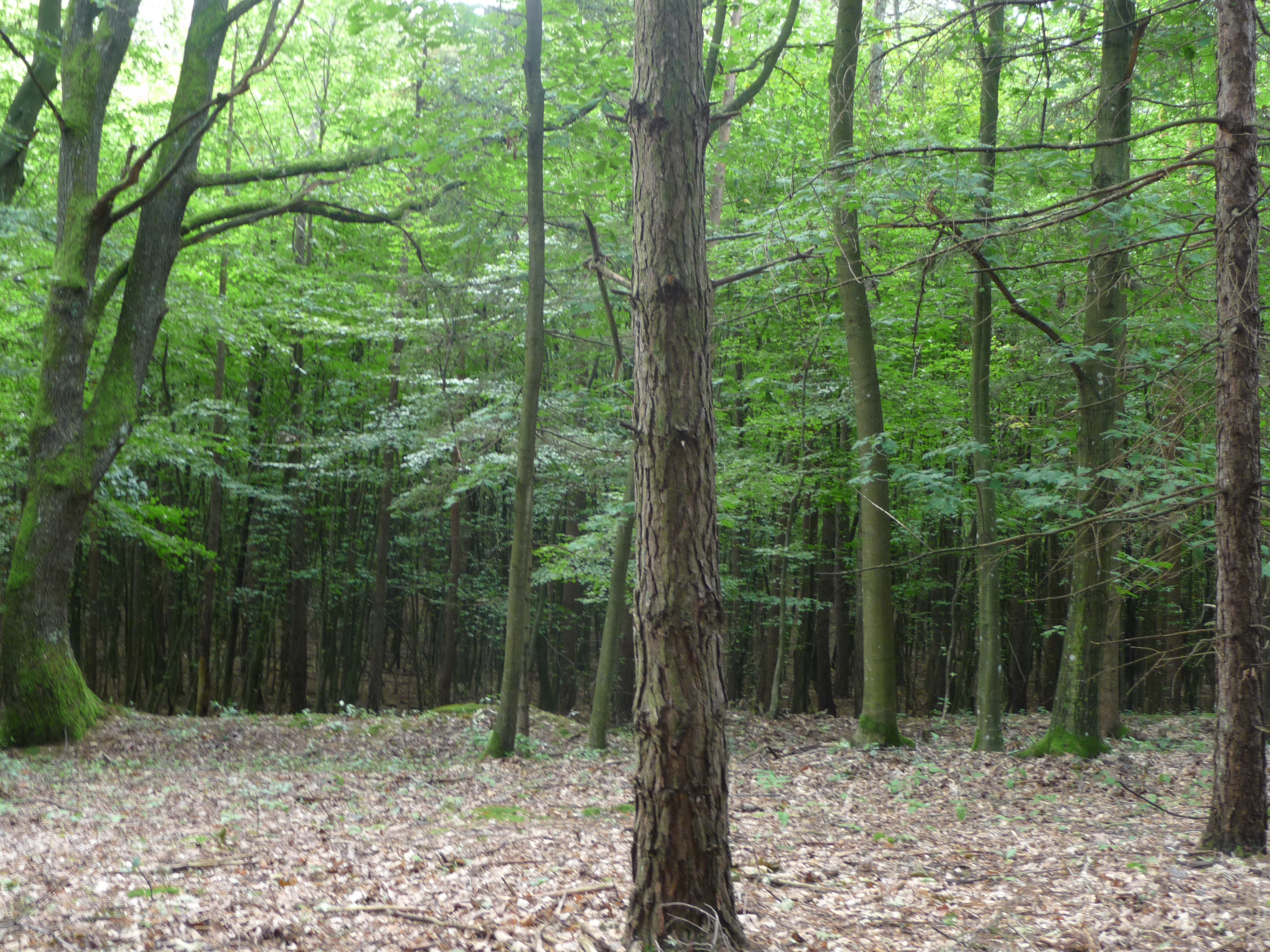 A Szent Vencel templom romjai (Kercaszomor, Pusztatemető)